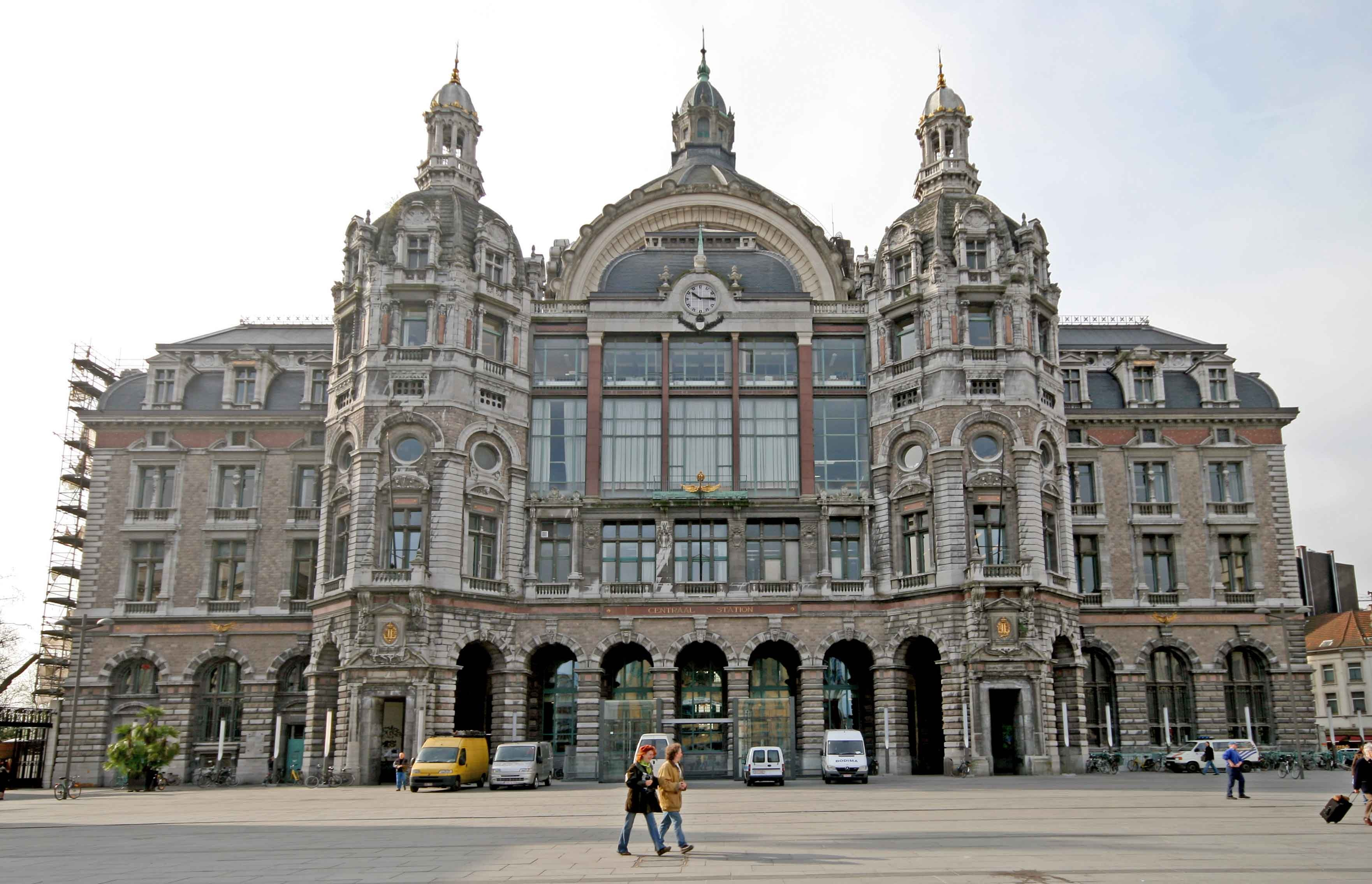 Gare zu Antwerpen.